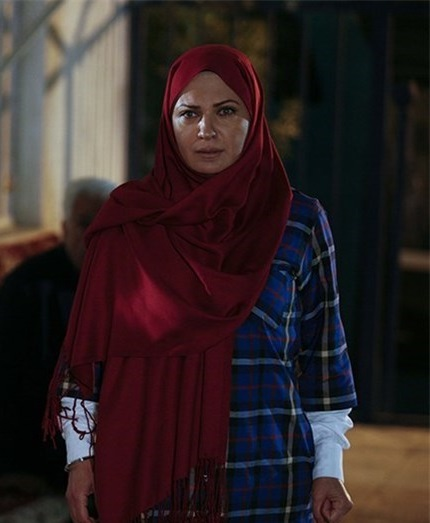 لعیا زنگنه